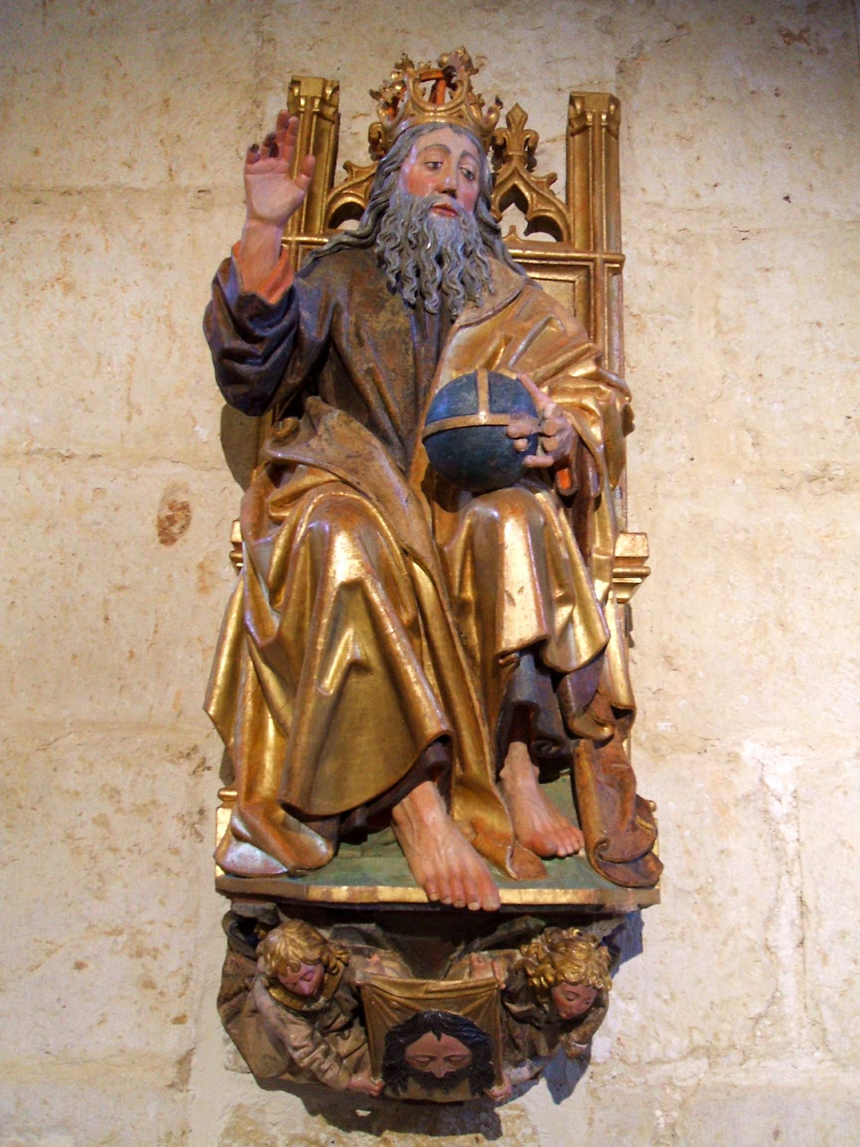 Iglesia-Museo de Santa María - Padre Eterno, Alejo de Vahia (Becerril de Campos, Palencia)